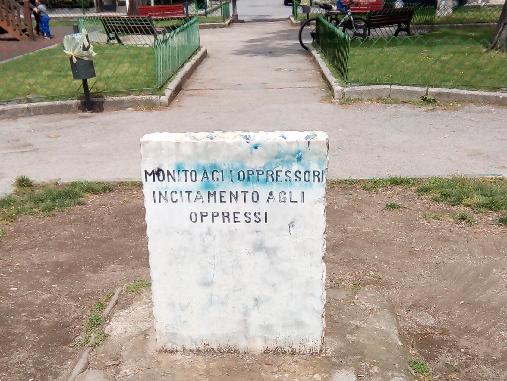 Cippo in ricordo della strage nazista di Acerra